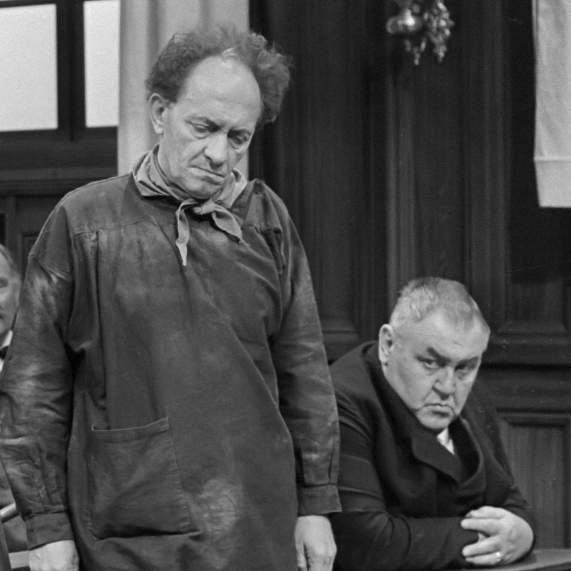 TV-opnamen Tros van stuk "De zaak Brument" ; links staan Sacco van der Made in de rol van kastelein, naast hem Paul Meyer als Brument 13 april 1976